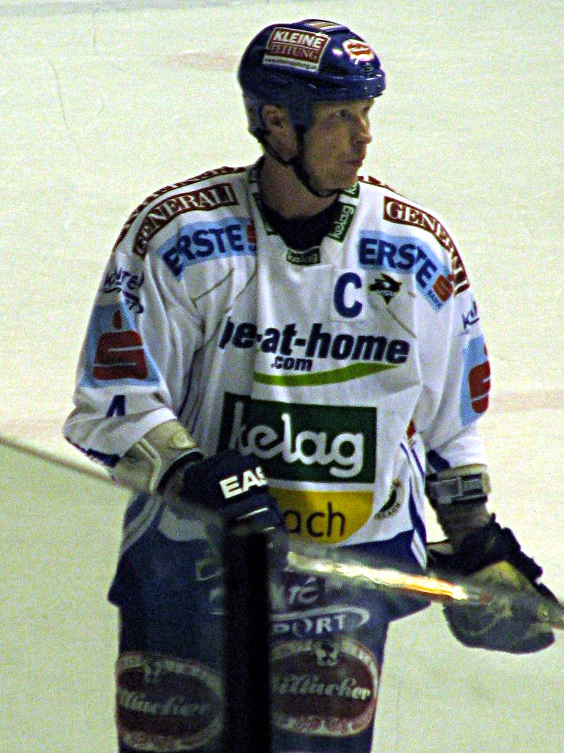 Michael Stewart 271009.jpg